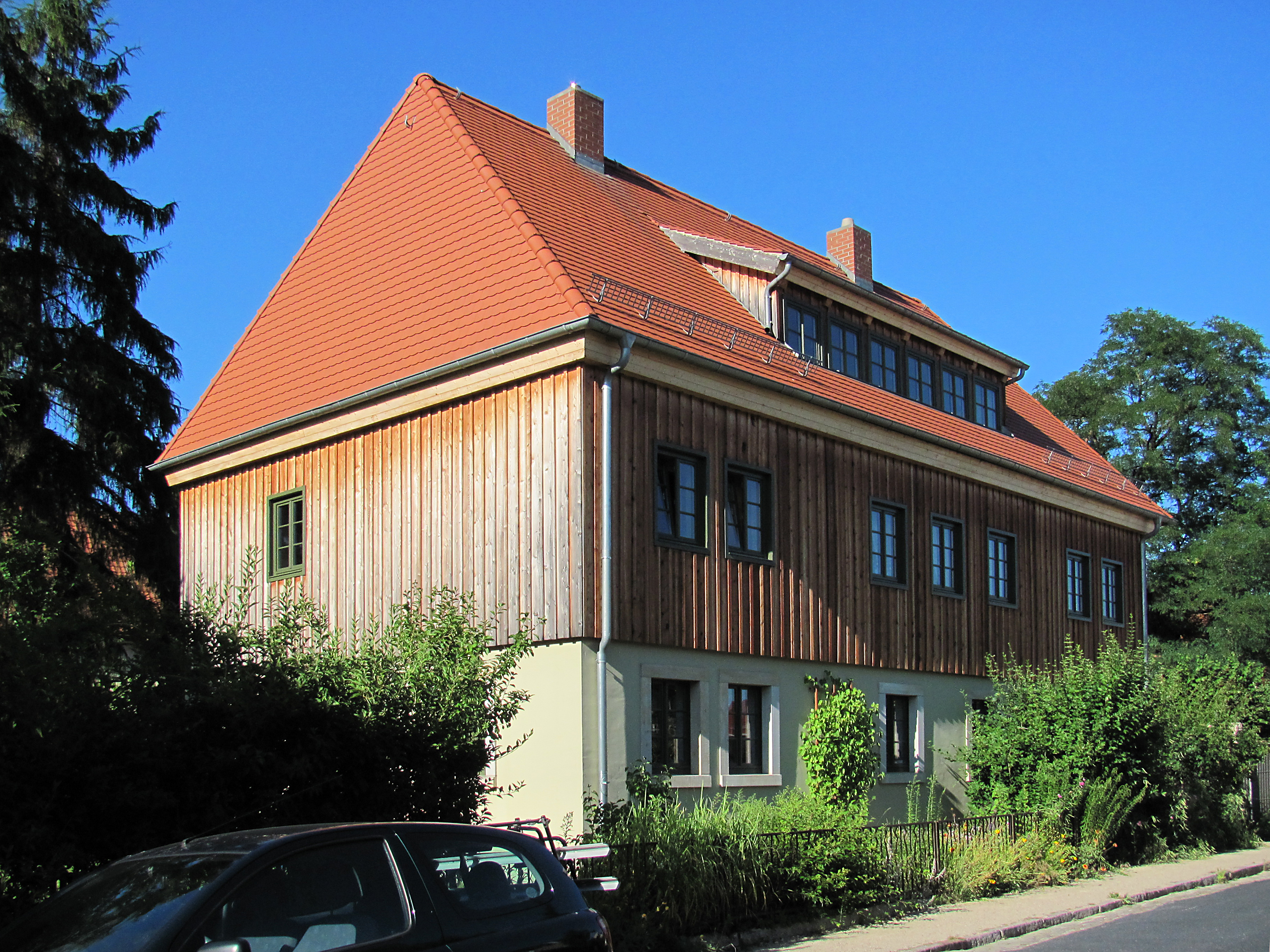 Radebeul, Haus Clauß von Westen